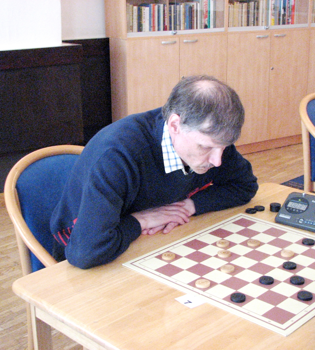 Orme Kaul mängimas Eesti välkkabe meistrivõistlustel